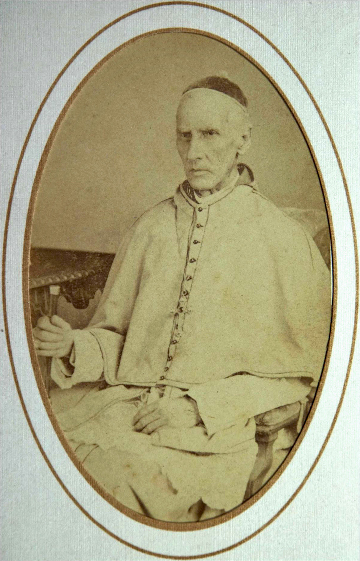 José Ignacio Montoya Palacio (*1816-†1884), obispo de Medellín entre 1876-1884.